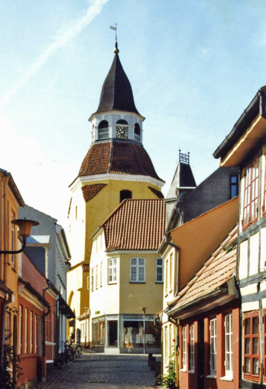 Faaborg met Klokkentoren (Klokketårn